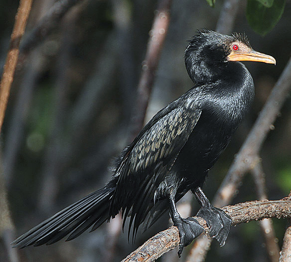 Image taken at Makasutu from a canoe.